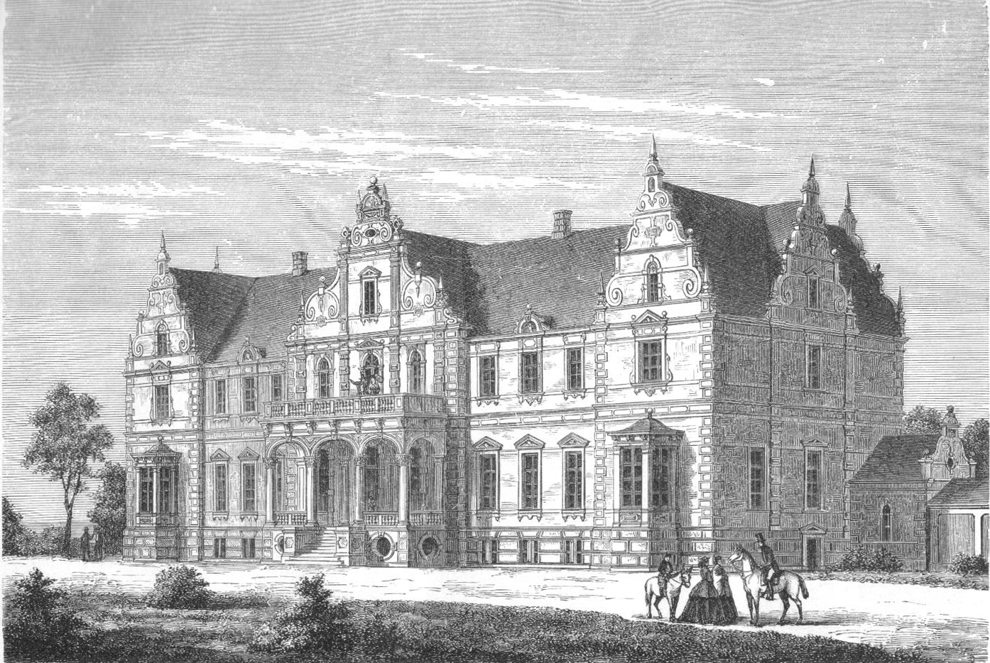 Herregaarden Kokkedal ved Rungsted.